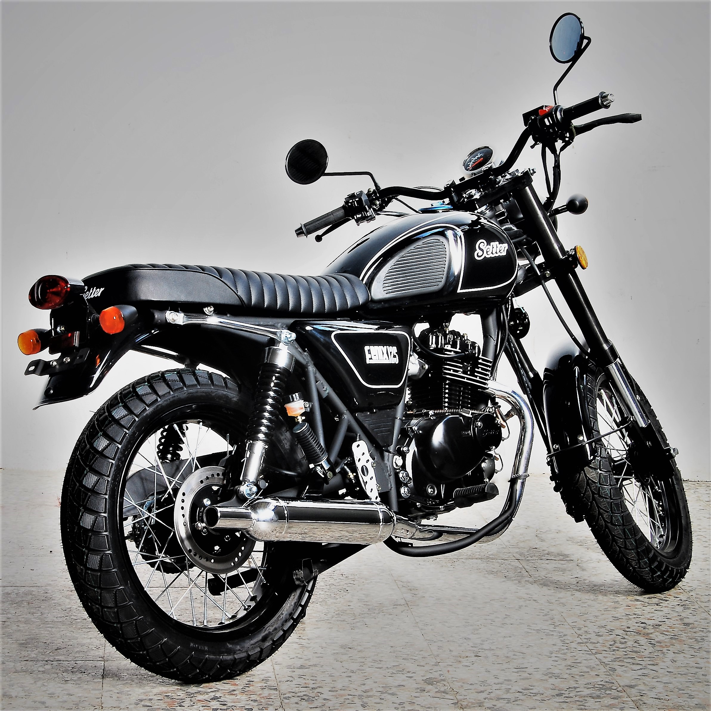 Setter Fenix 125 cc - 2017